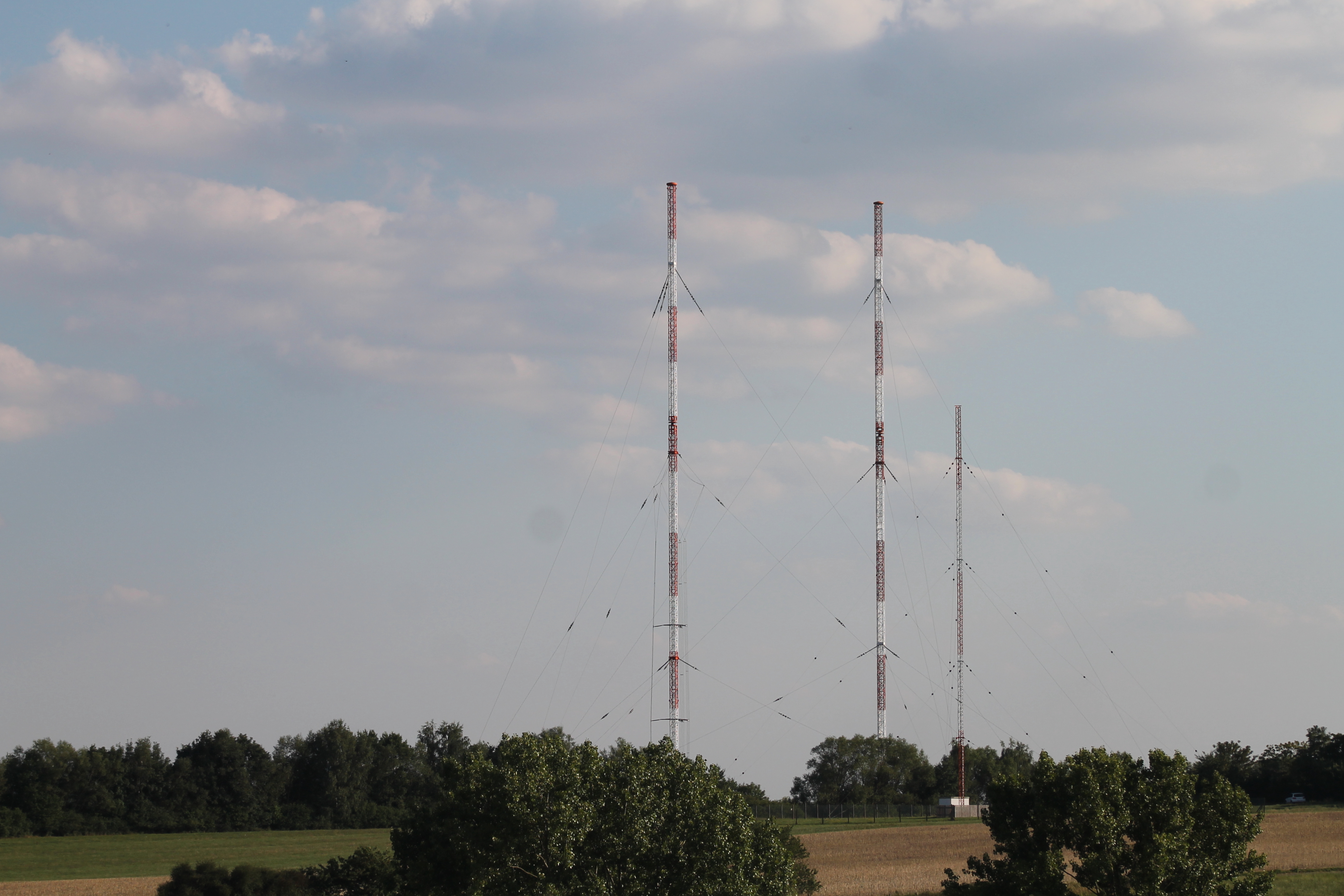 Sender Heusweiler - Google Maps - Google Earth